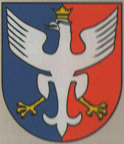 Erb obce Vyšný Orlík